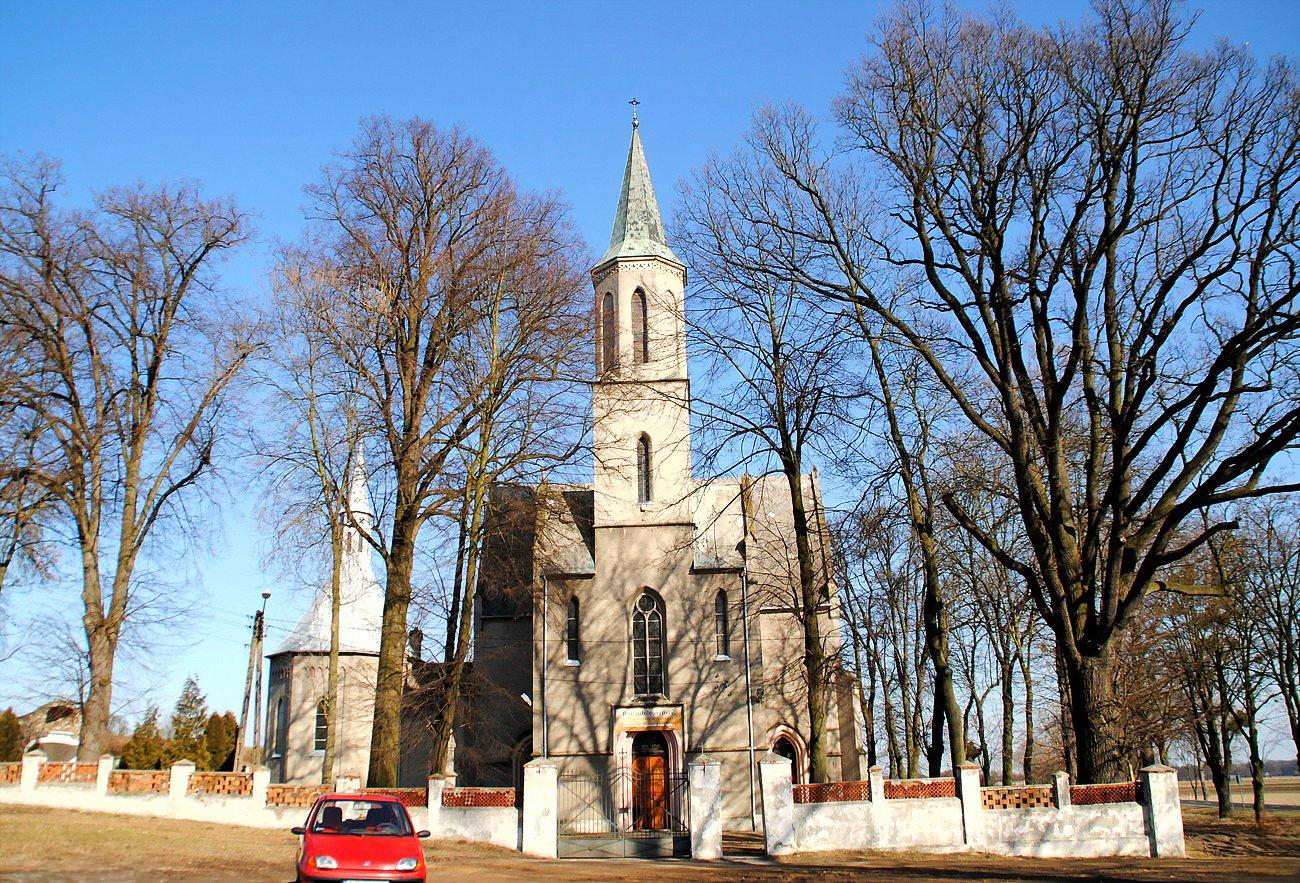 Ujazd -Studzionka Kościół pątniczy pw. nawiedzenia NMP. Budowa 1858 - 1862 Budowa tej świątyni związana jest z legendą o cudownych właściwościach wody z pobliskiego źródełka (według podań woda uzdrawia wzrok )